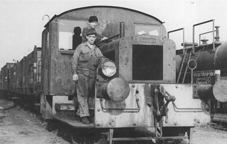 Werkslok des Eilenburger Zelluloidwerks, Diesellok Das Ziel trotz Schwierigkeiten erreicht - Eilenburger Zelluloidwerk produziert seit 1. Oktober 1949 für 1950. siehe Begleittext. UBz: Die Aktivisten Oskar Timm und Bruno Naumann mit der instandgesetzten Diesel-Lok. Aufn. Illus Paalzow 4500-49 Nov. 1949 (1)